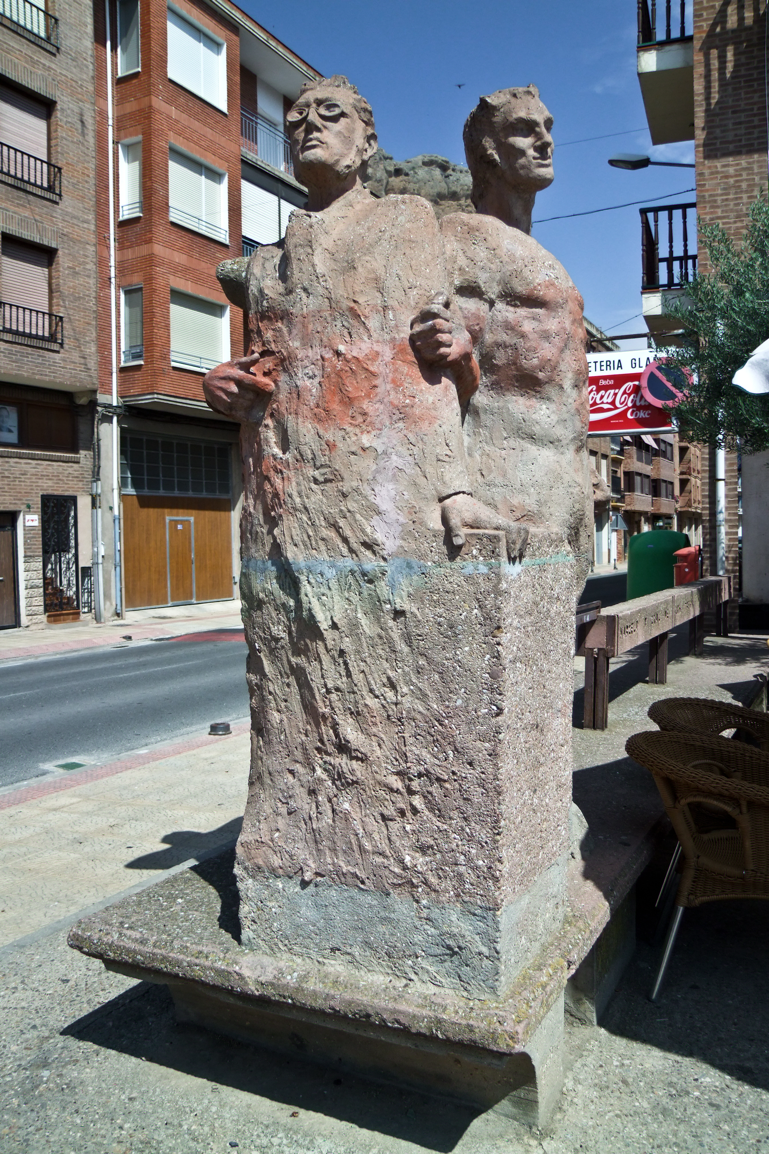 Monumento a Bretón de los Herreros en Quel, su localidad natal, La Rioja - España